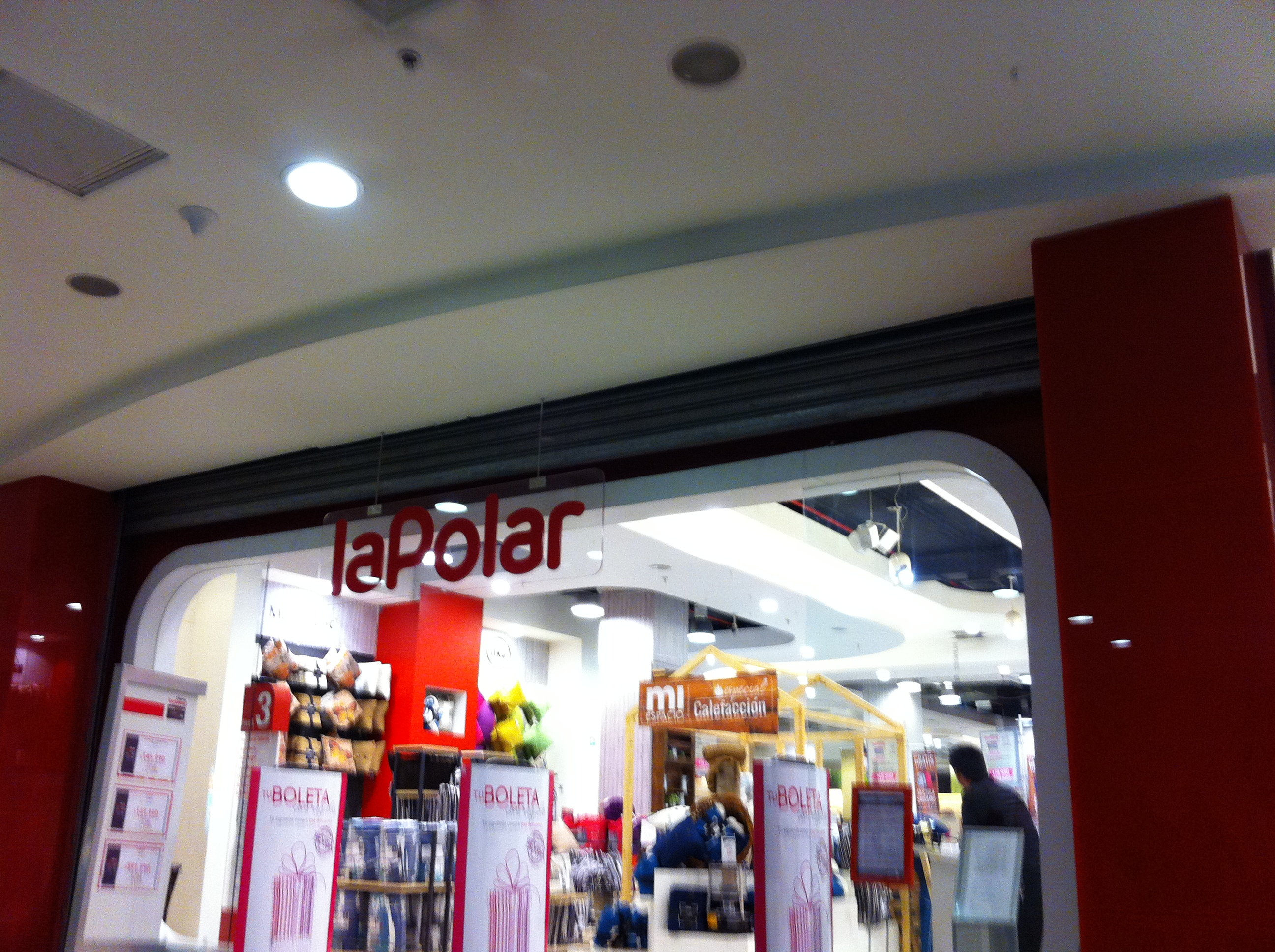 La Polar